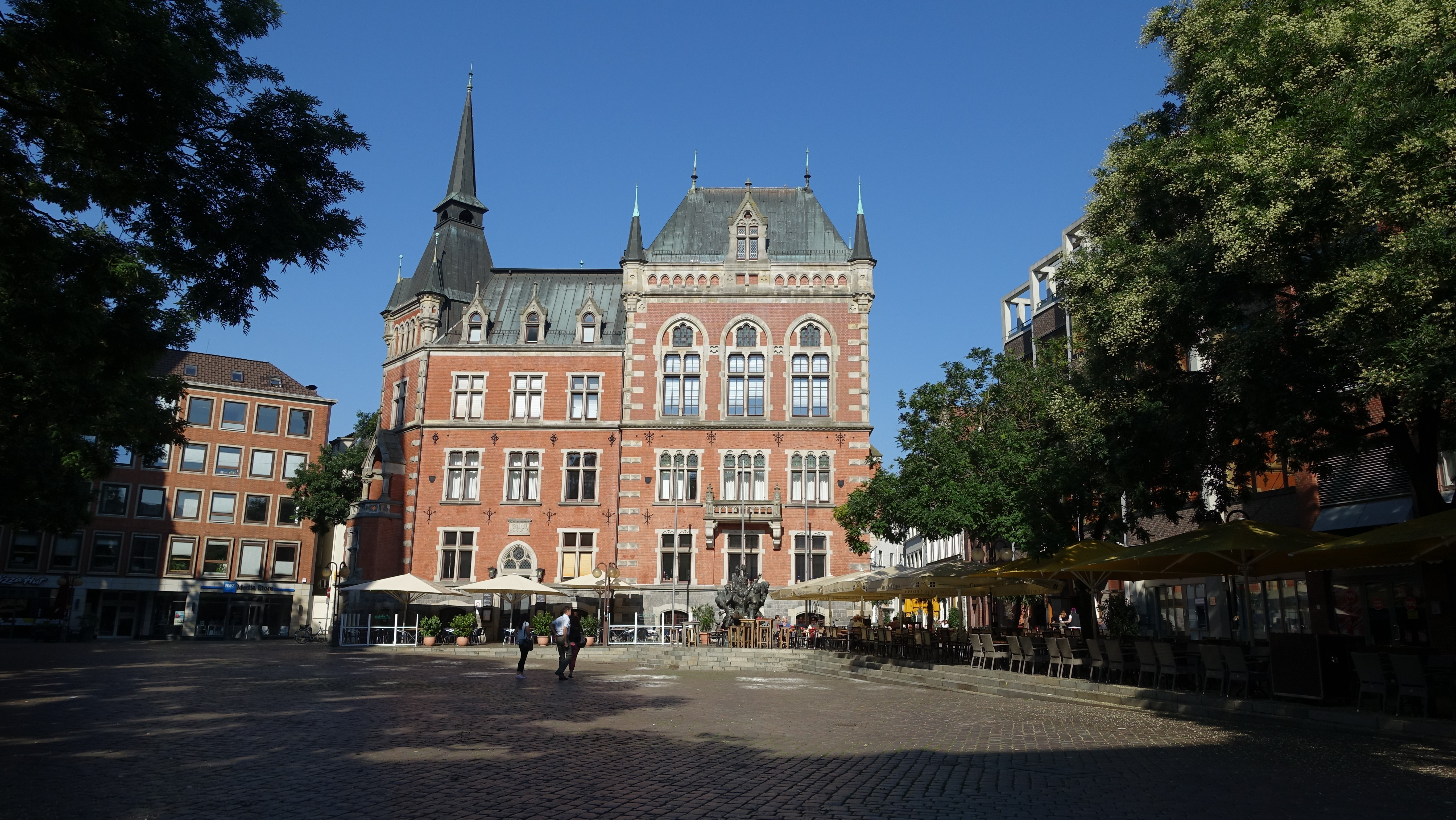 Oldenburg (Oldenburg) - Rathaus mit Platz